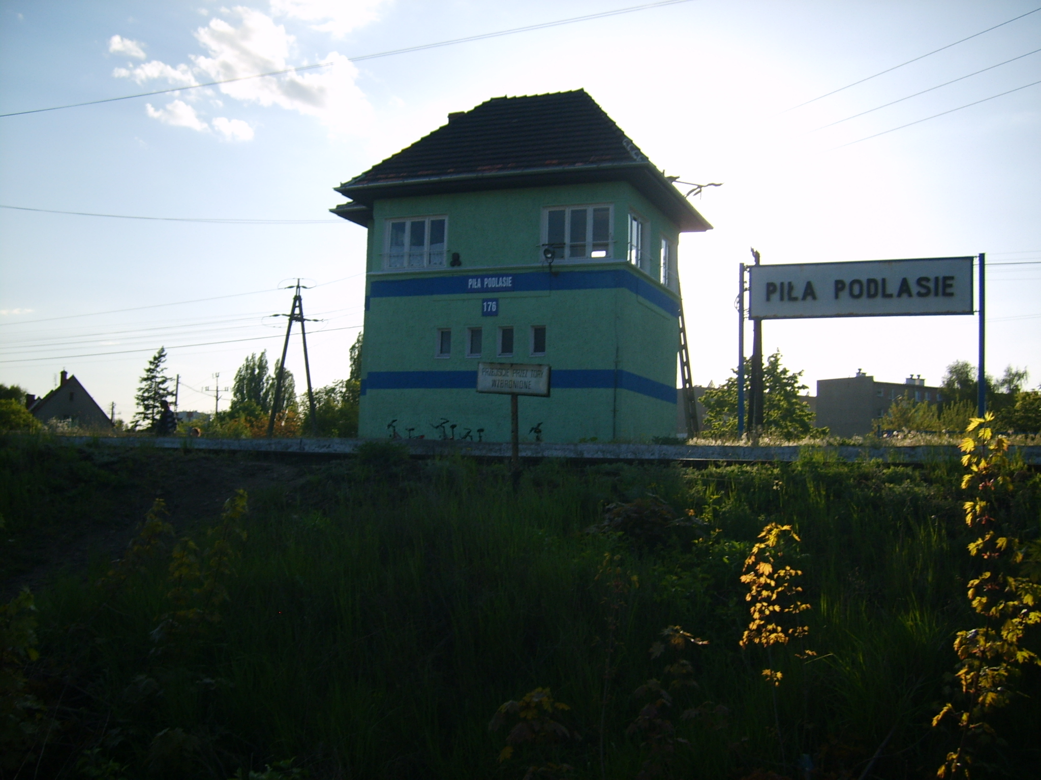 Przystanek kolejowy Piła Podlasie.